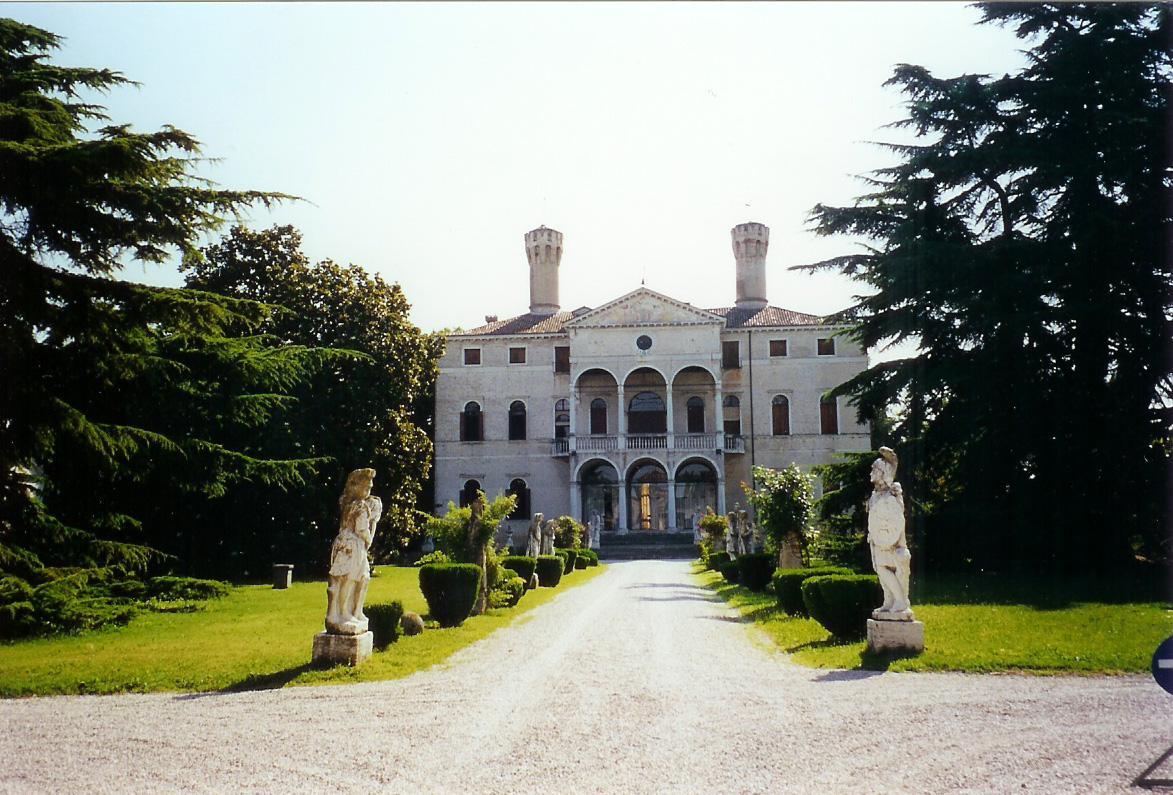 Villa Castello Giustinian in Roncade, Treviso